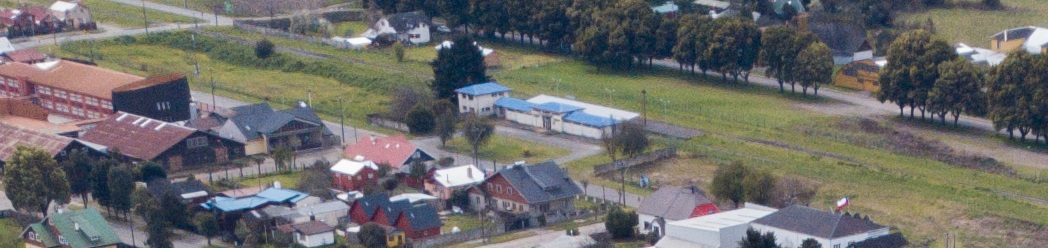 Imagen aérea de la estación de ferrocarriles de Llanquihue, 2017.